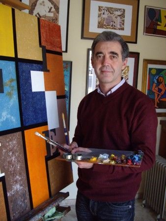 Jose Antonio Pelaez Ochoa en su estudio de arte